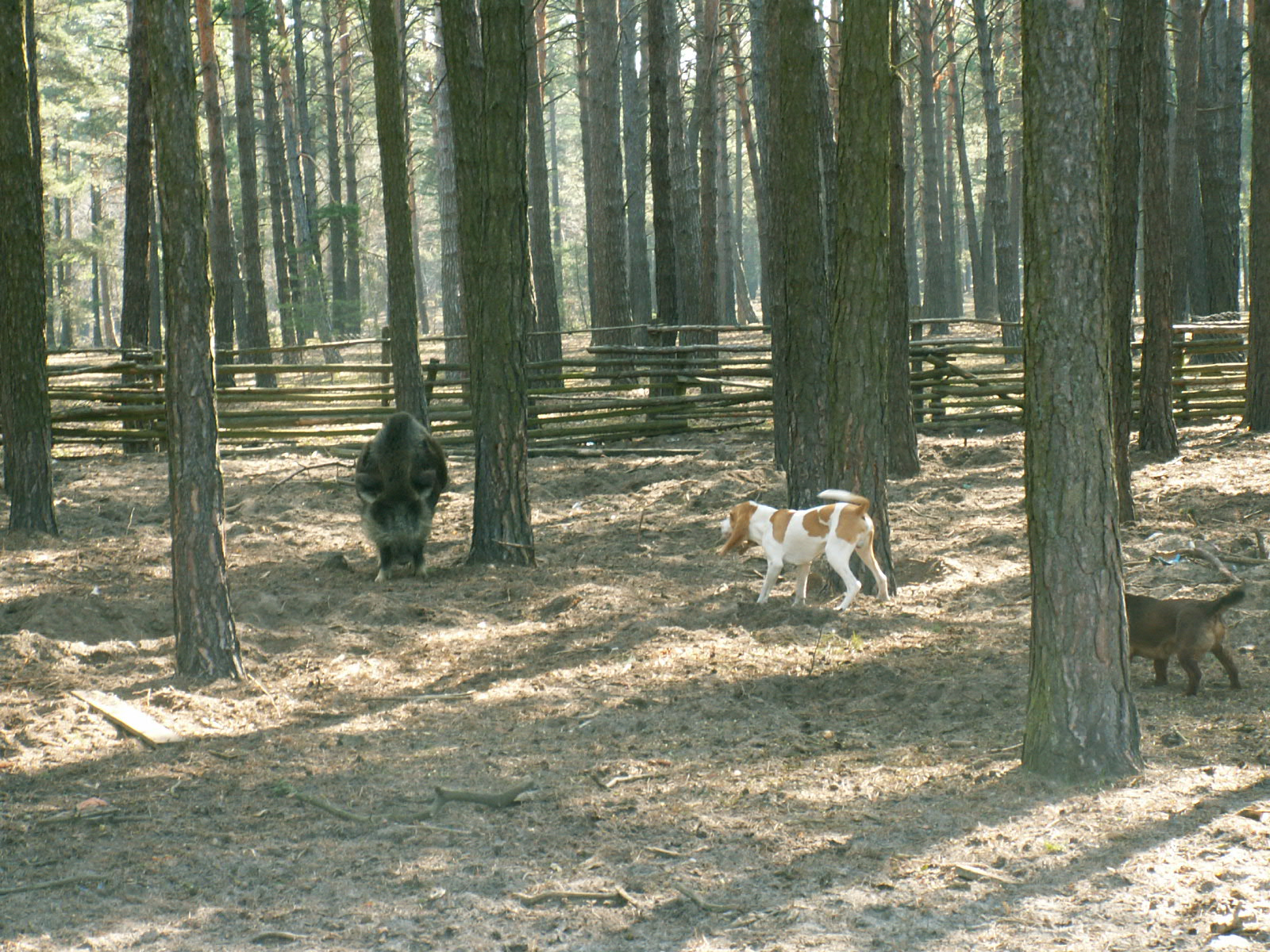 Schweizer Laufhund/Swiss Hound Variety: Schwyzer Laufhund/Schwyz Hound - Dryas Olaska (his website in english).